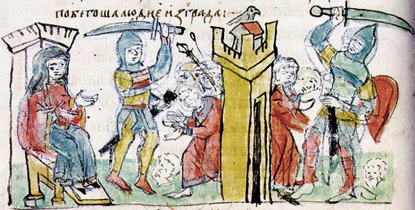 Radzivill chronicle. Olga's avenge to the Drevlians. Четвертая месть Ольги за убийство мужа: сожжение древлянского города Искоростеня и расправу с его населением.